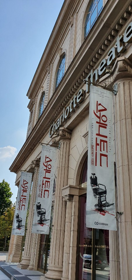 Musical Sweeney Todd ( Charlotte Theater 2019)